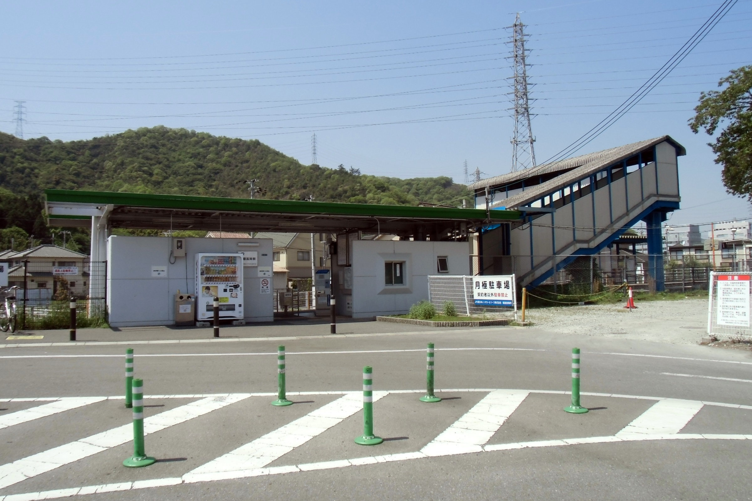 姫新線播磨高岡駅